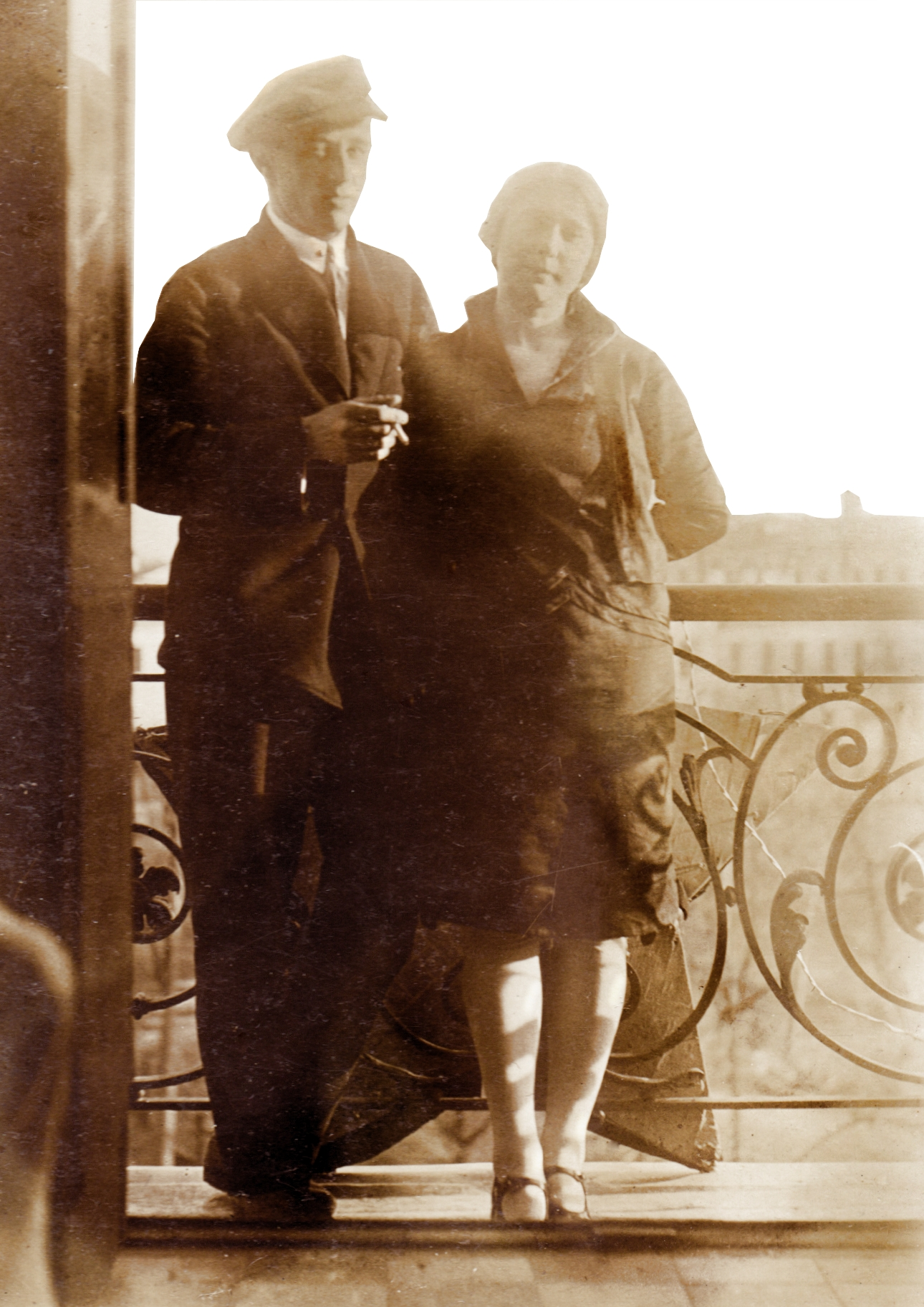 Cергей Иванович Маркин и Мария Семёновна Ильина. Москва, Чистые пруды.